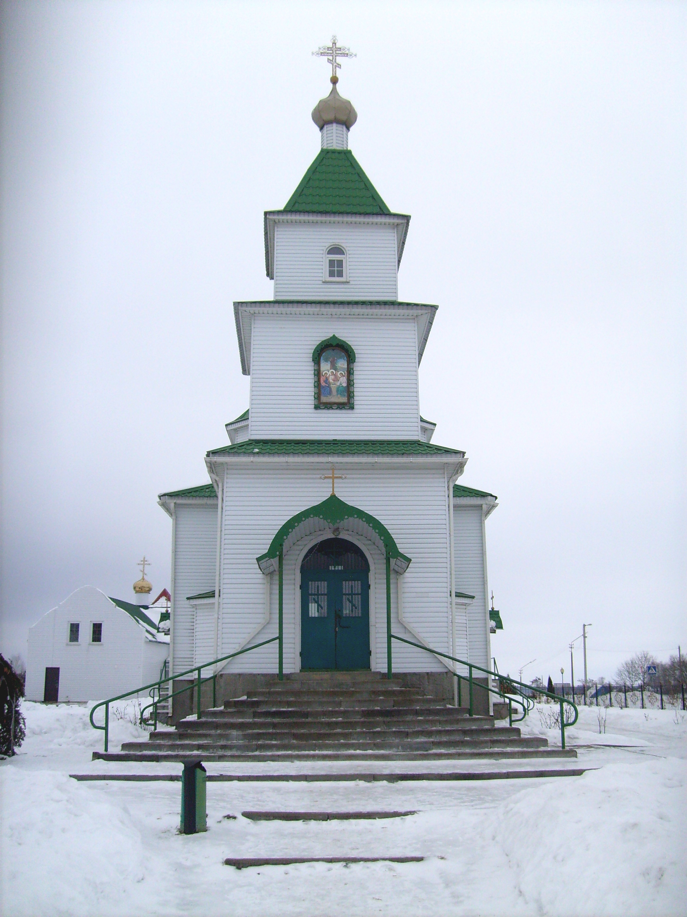 Свято-Троицкая церковь в Круглом